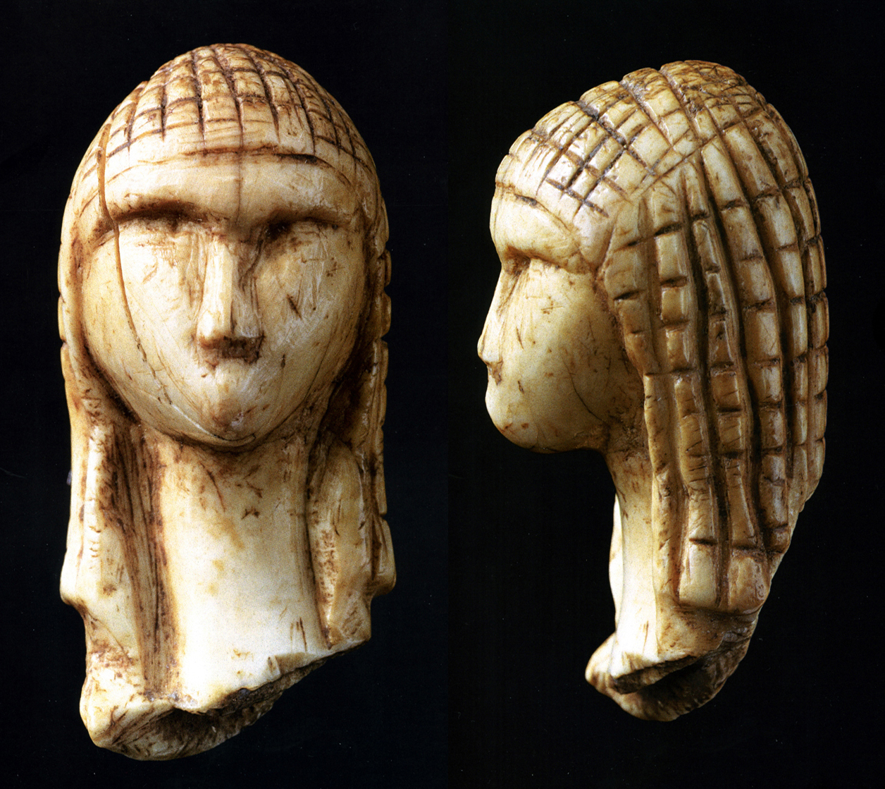 Dame de Brassempouy (25000 ans)(Montage photo personnel)